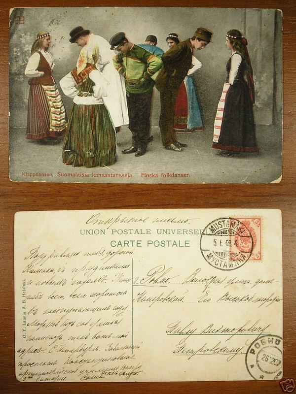 "Finska folkdancer". Card 1907 Mustamaki, Finland to Rovno, Ukraine. 1905 Russia stamp 3k.